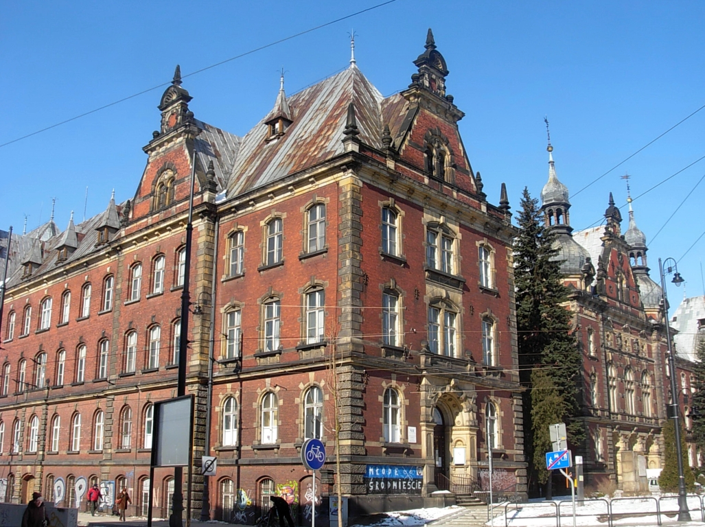 Budynek dawnej dyrekcji Kolei Wschodniej w Bydgoszczy